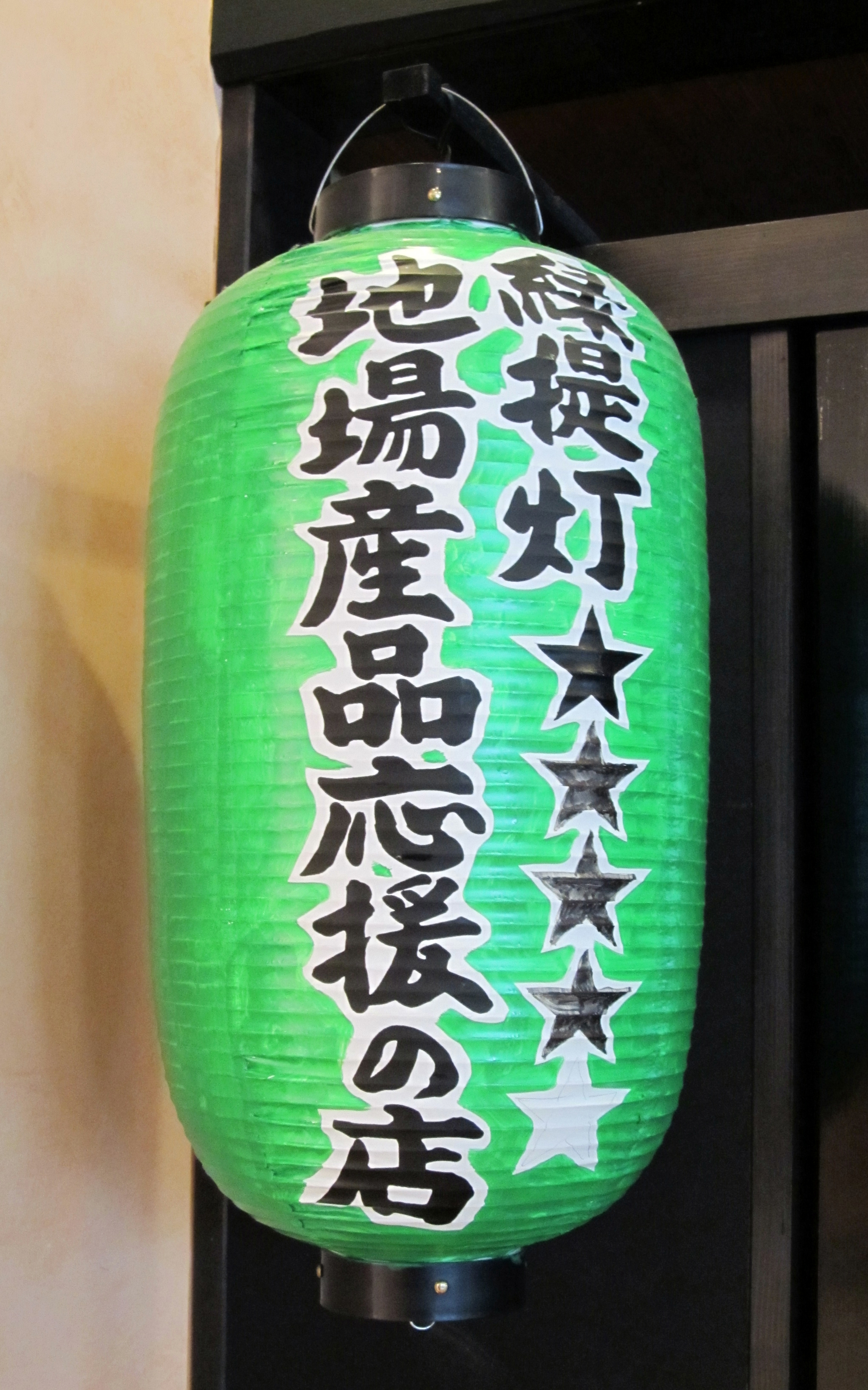 緑提灯（星4つ）。